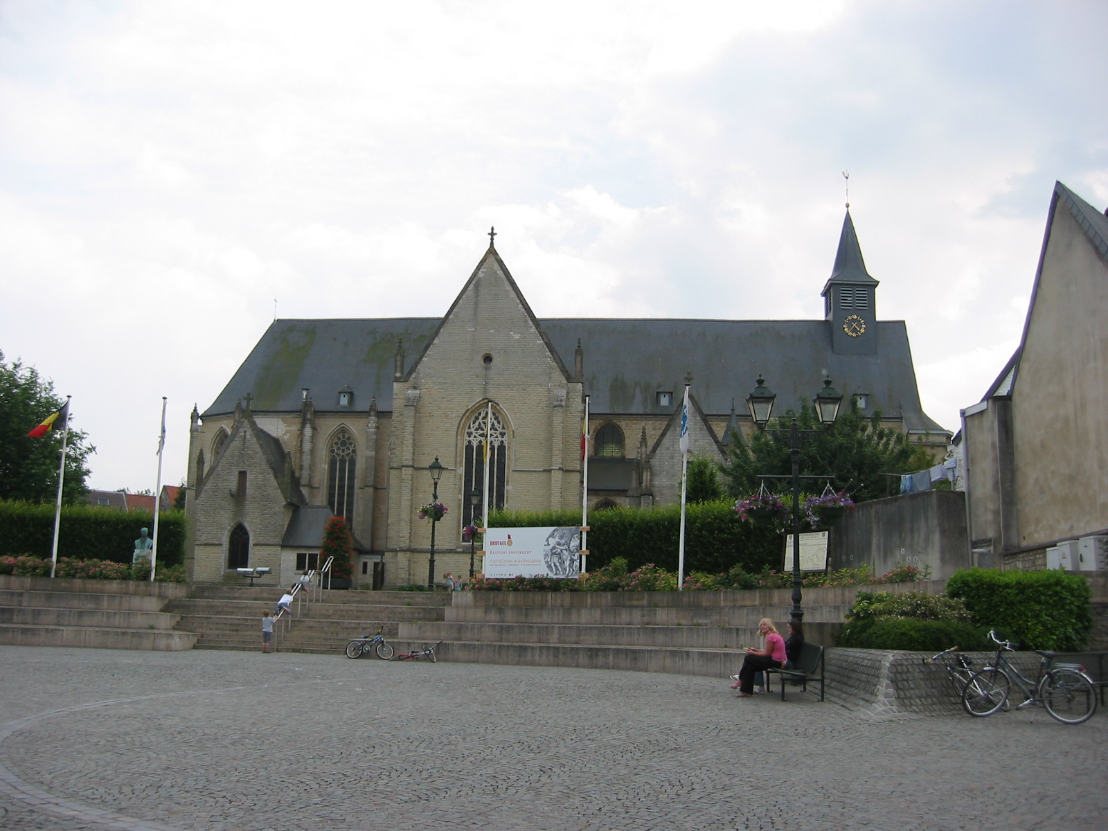 De Sint-Jan-Evangelistkerk te Tervuren. (Gemaakt in juni 2006)